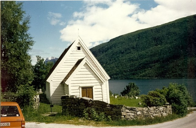 Ålfoten kirke